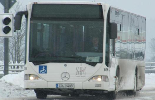 Wagen 108 der SÜC Bus & Aquaria GmbH